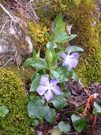 grande pervenche